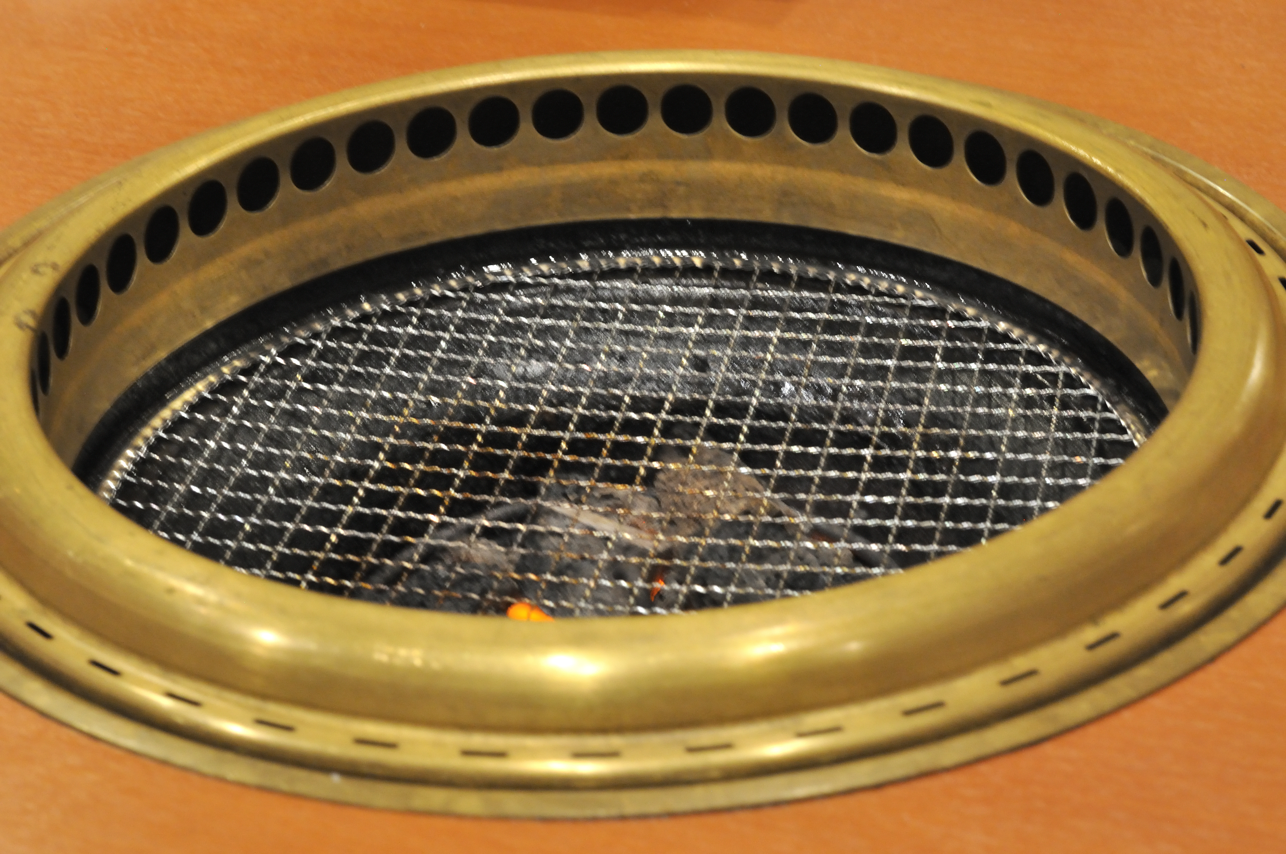 焼き肉の無煙ロースター